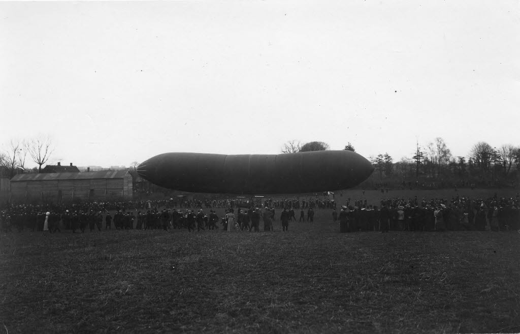 der Gebrüder Bruno und Franz Steffen auf dem Flugplatz im Bereich der heutigen Steffenstraße in Kronshagen.